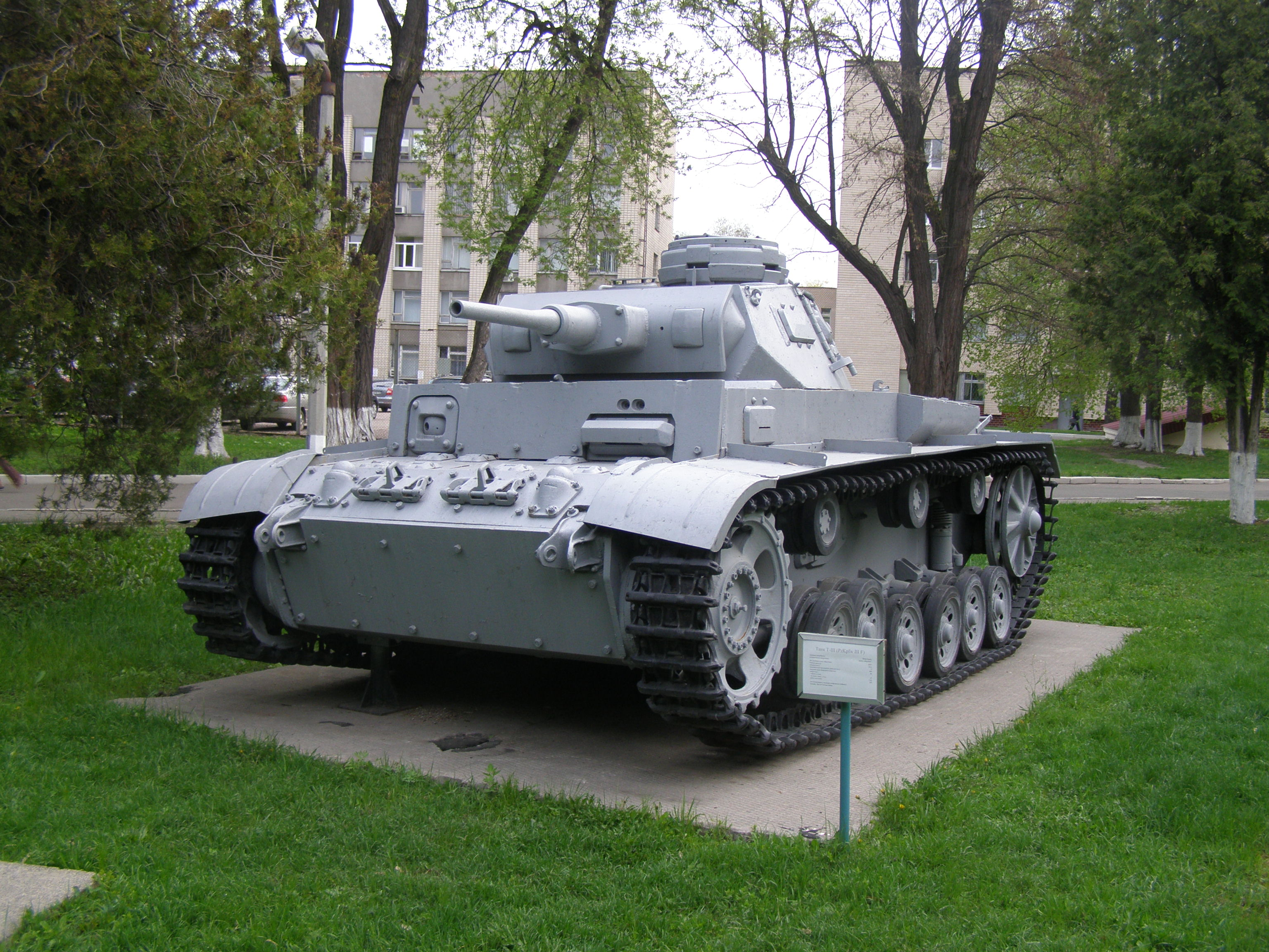 Panzerkampfwagen III на майданчику Національного університету оборони України в Києві